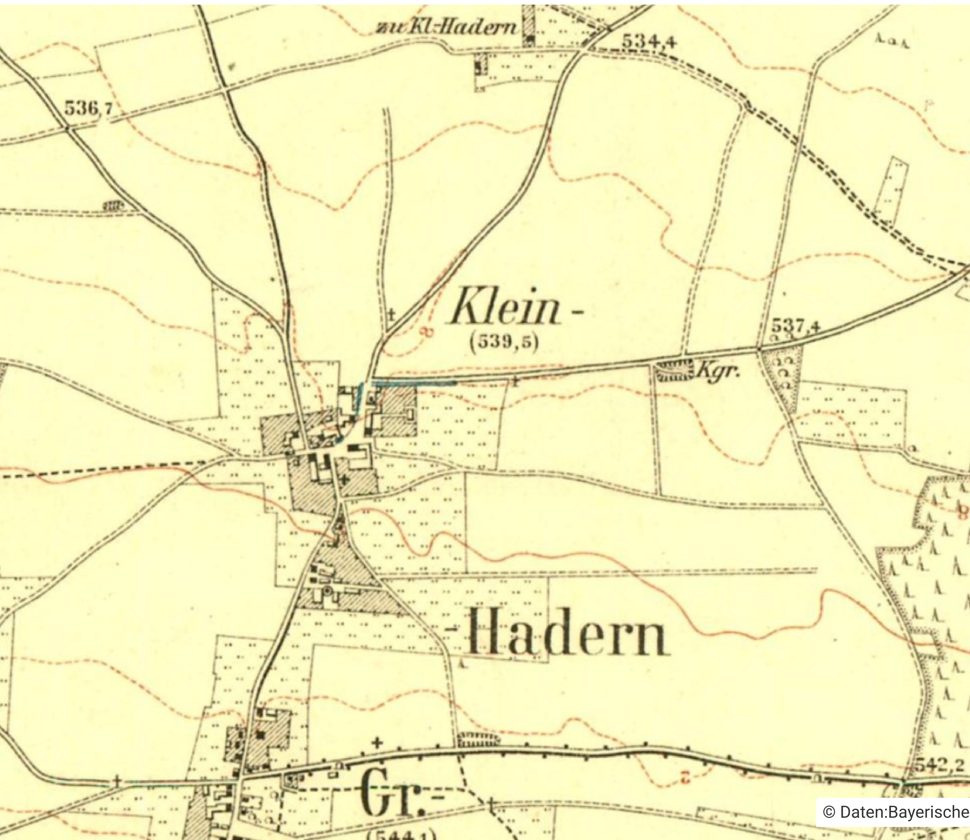 München-Kleinhadern, Ausschnitt der 1:25.000-Zeitreise-Karte vom